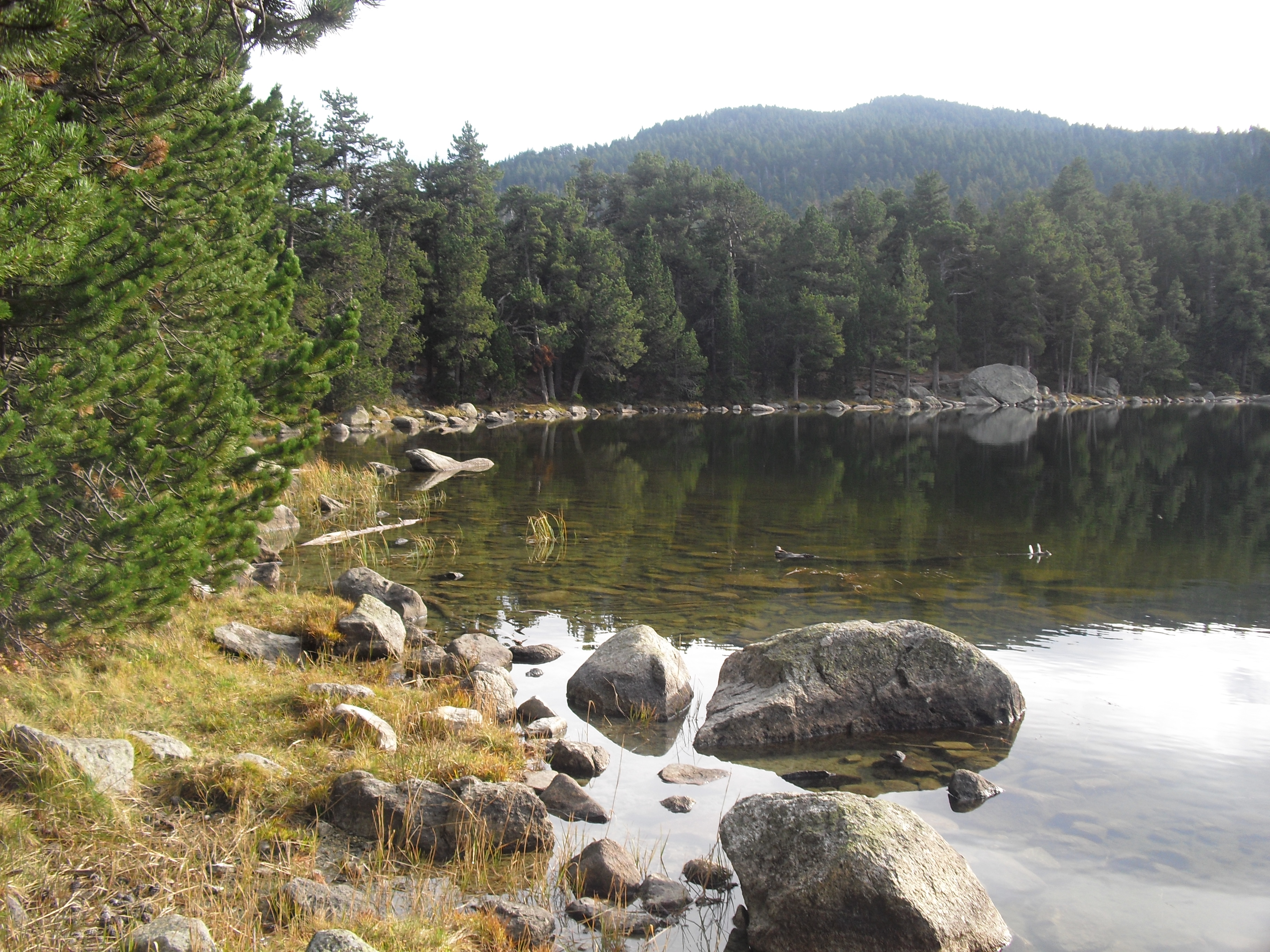 Étang de Querigut.